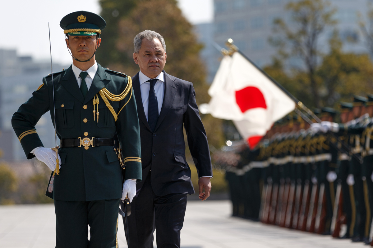 Визит Министра обороны России генерала армии Сергея Шойгу в Токио на переговоры с японским коллегой Томоми Инадой (г. Токио, Япония)